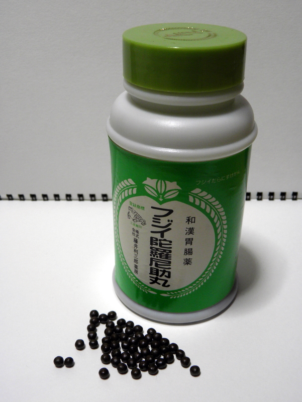 フジイ陀羅尼助丸（オウバクを主成分とした丸薬）- 藤井利三郎薬房（奈良県吉野郡吉野町吉野山）